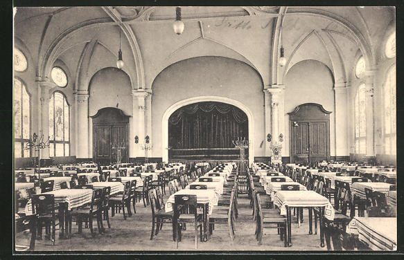 AK Berlin-Wedding, Gasthof der Versuchs- und Lehrbrauerei, Amrumerstraße